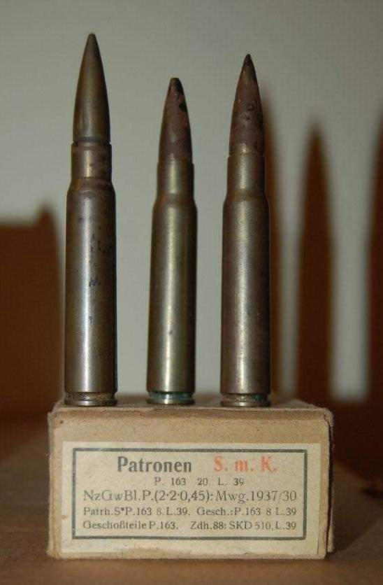 Infanteriemunition auf einer Pappschachtel (Verpackung)